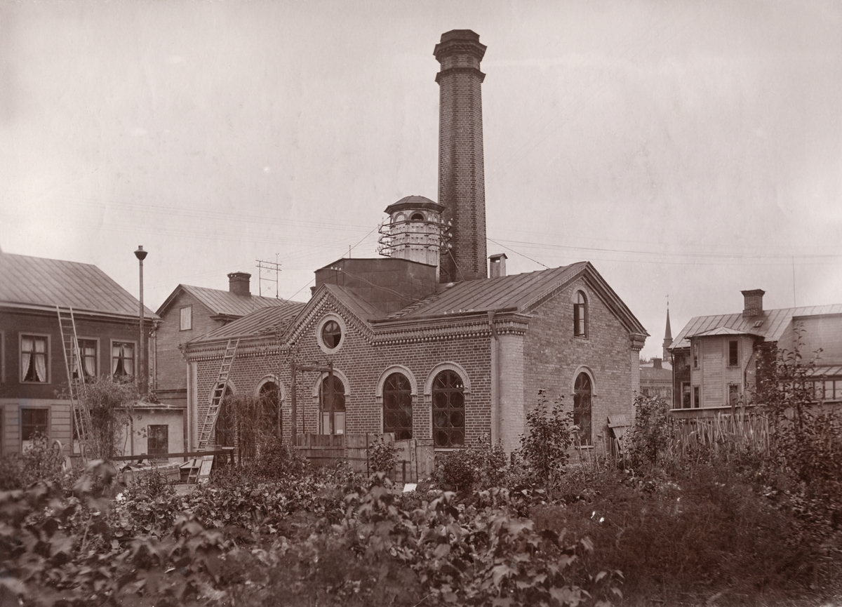 Ångkraftstationen i Söderhamn, riven